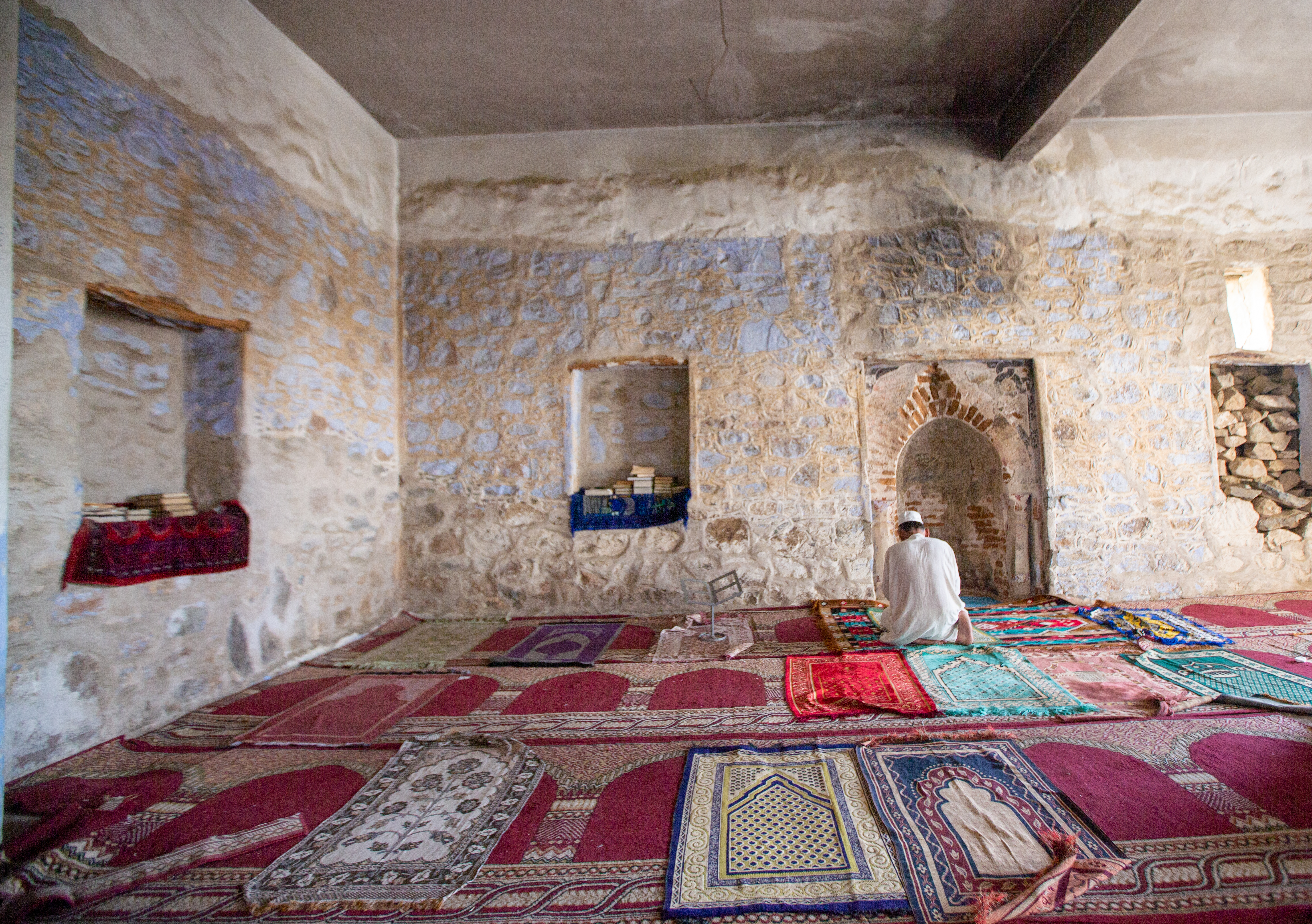 مسجد المدهون في محافظة الطائف